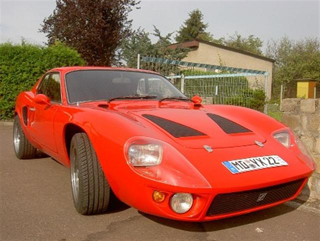 Fiberfab FT Bonito Eigenes Foto. Eigenes Auto. Eigene Kamera. Keine Urheberrechtsverletzung oder Copyright auf diesem Bild!